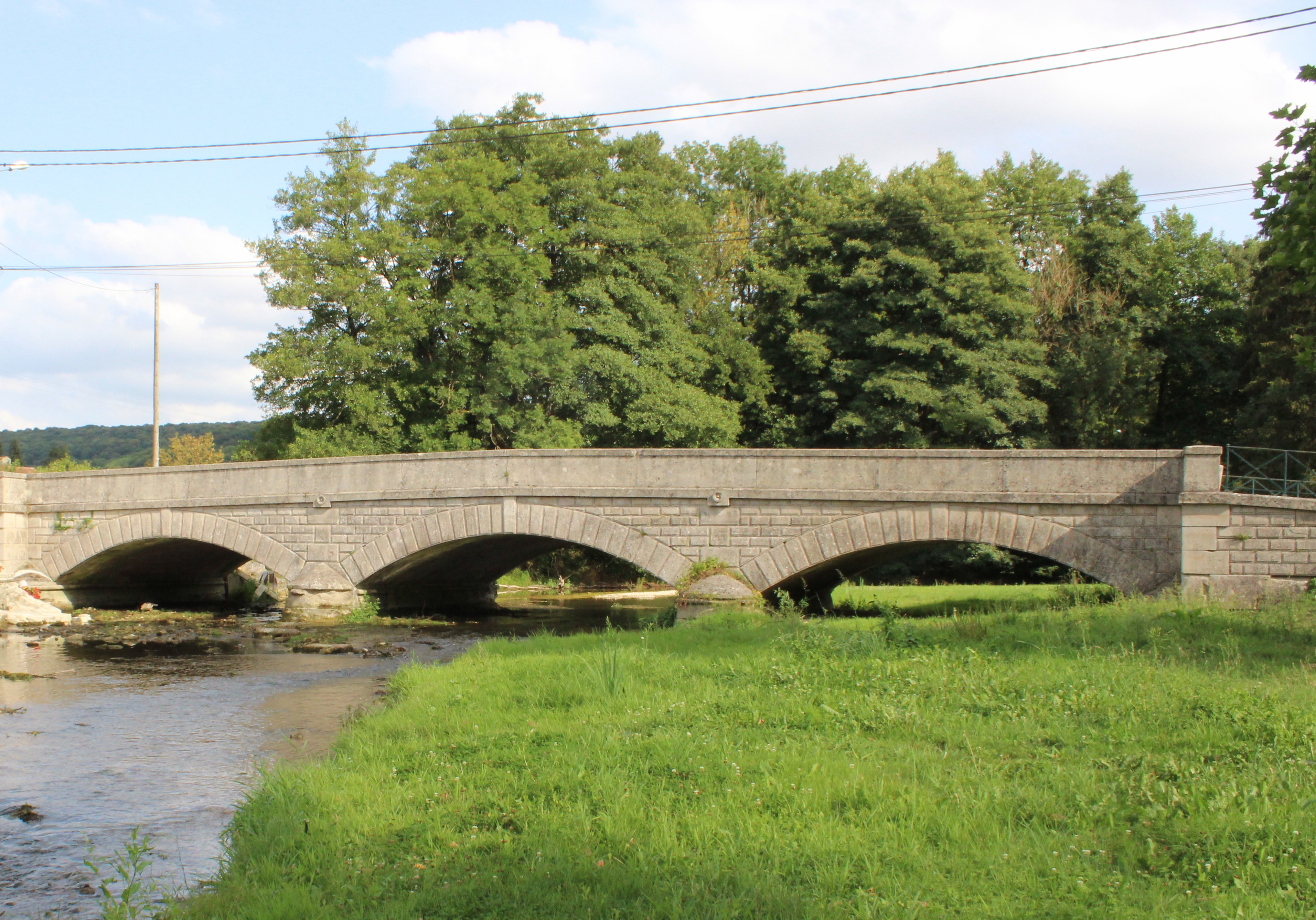 Le pont sur la Blaise.